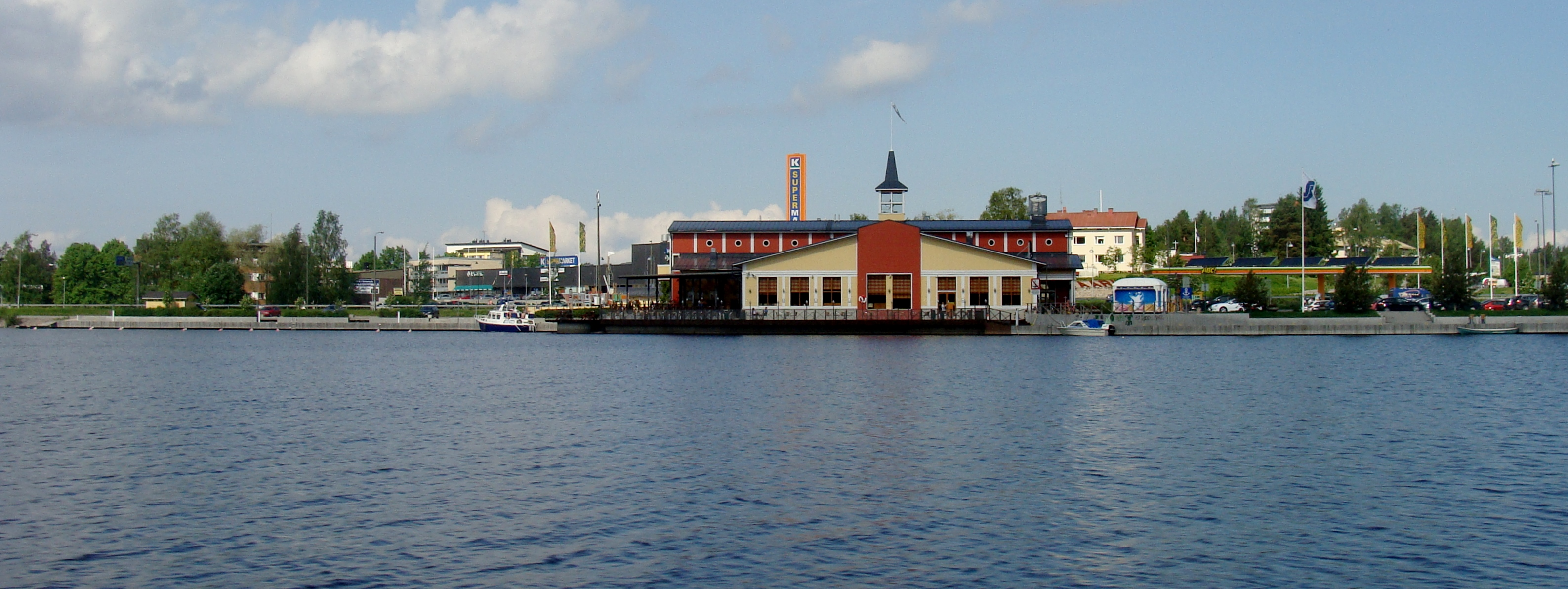 Viitasaaren kaupunki